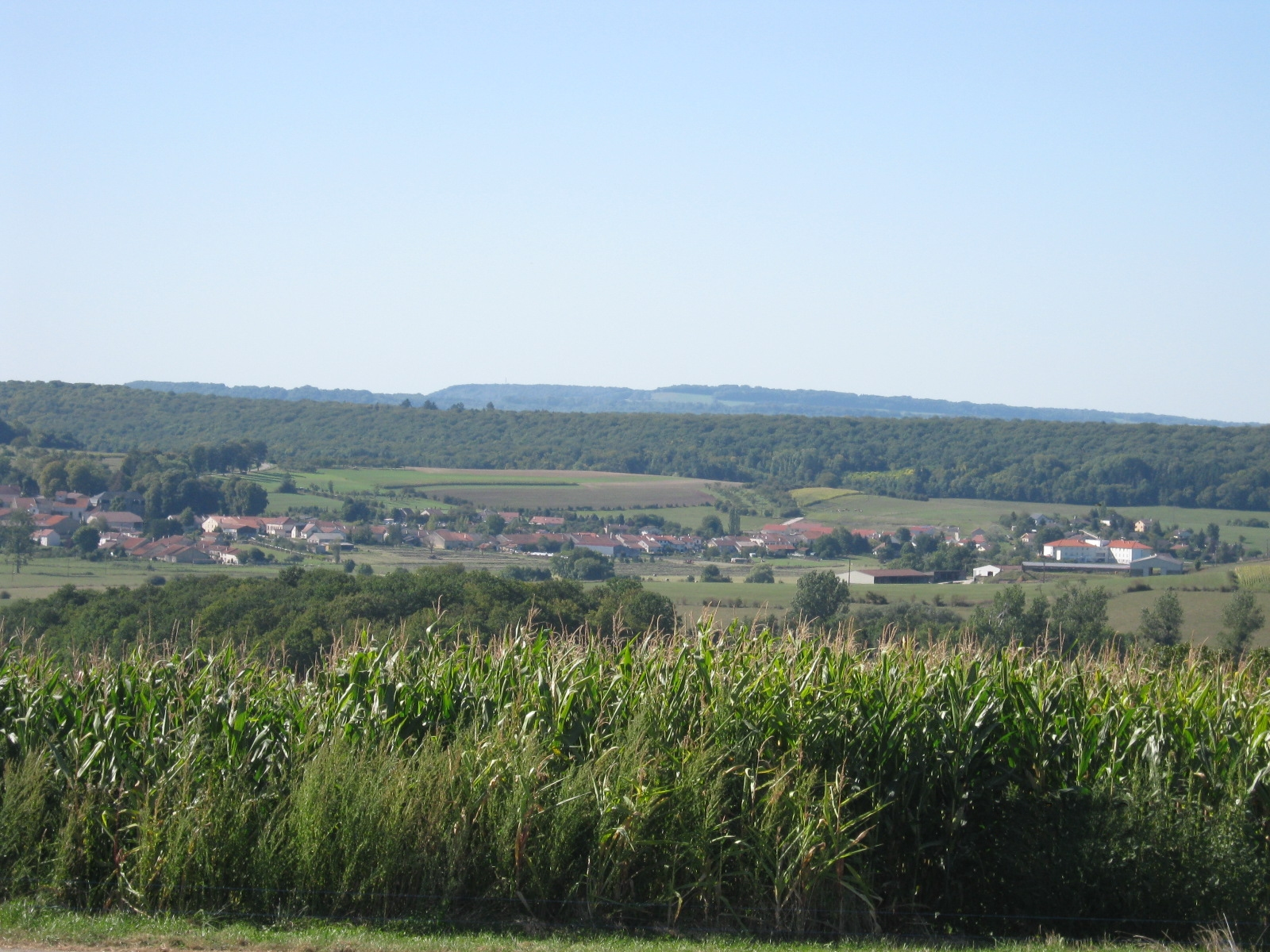 Mandres sur Vair